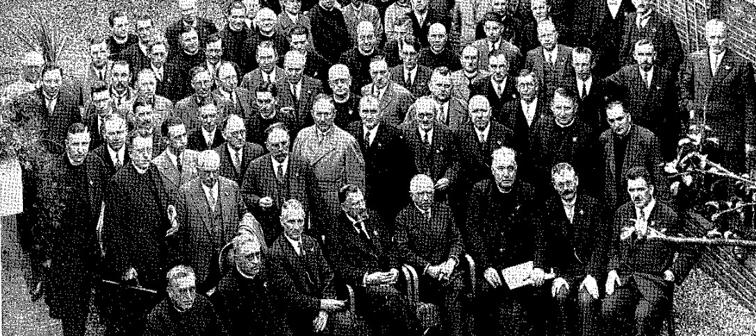 Familienarchiv Wilhelm Jakob, Sohn von Josef Jakob